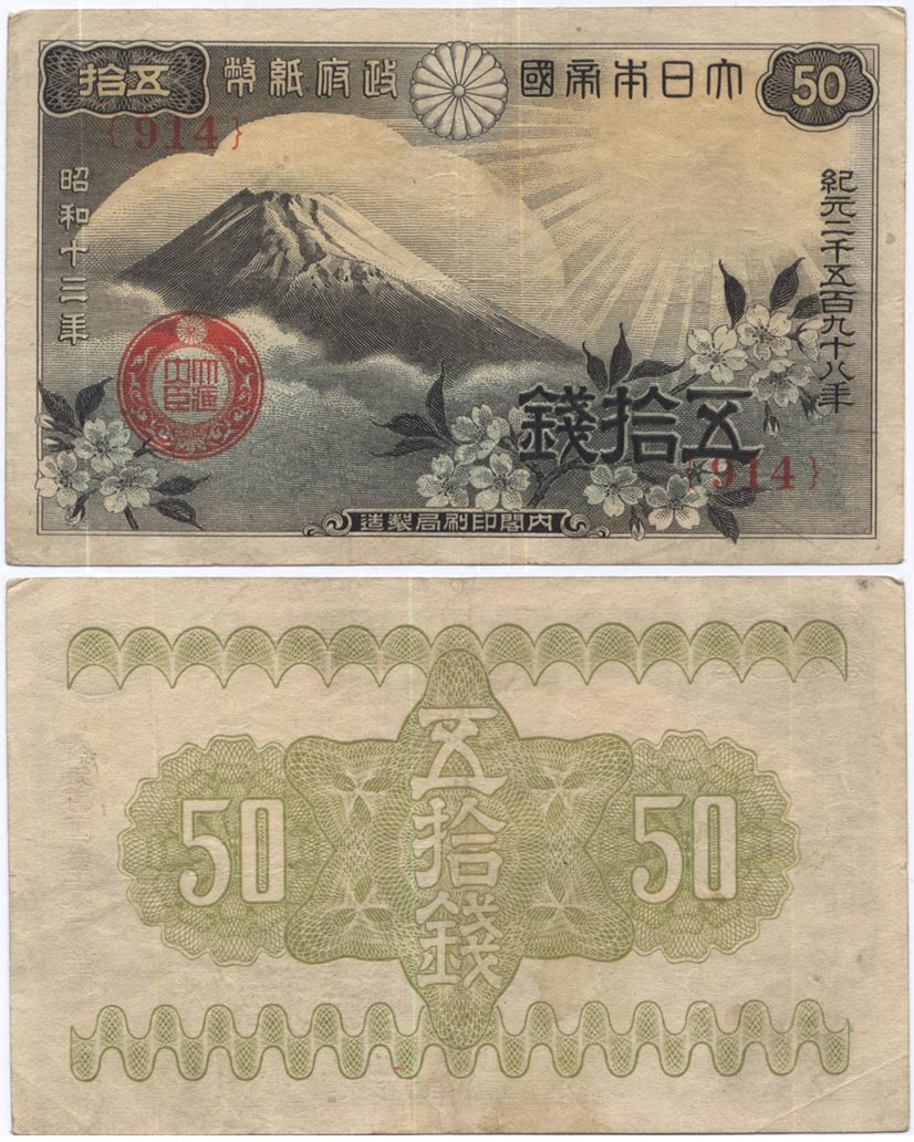 50 sen (= 1/2 Yen) Japanese Gervernment Bill. 1938.